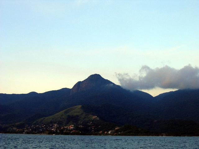 Foto tirada por mim em Ilhabela - São Paulo - Brasil